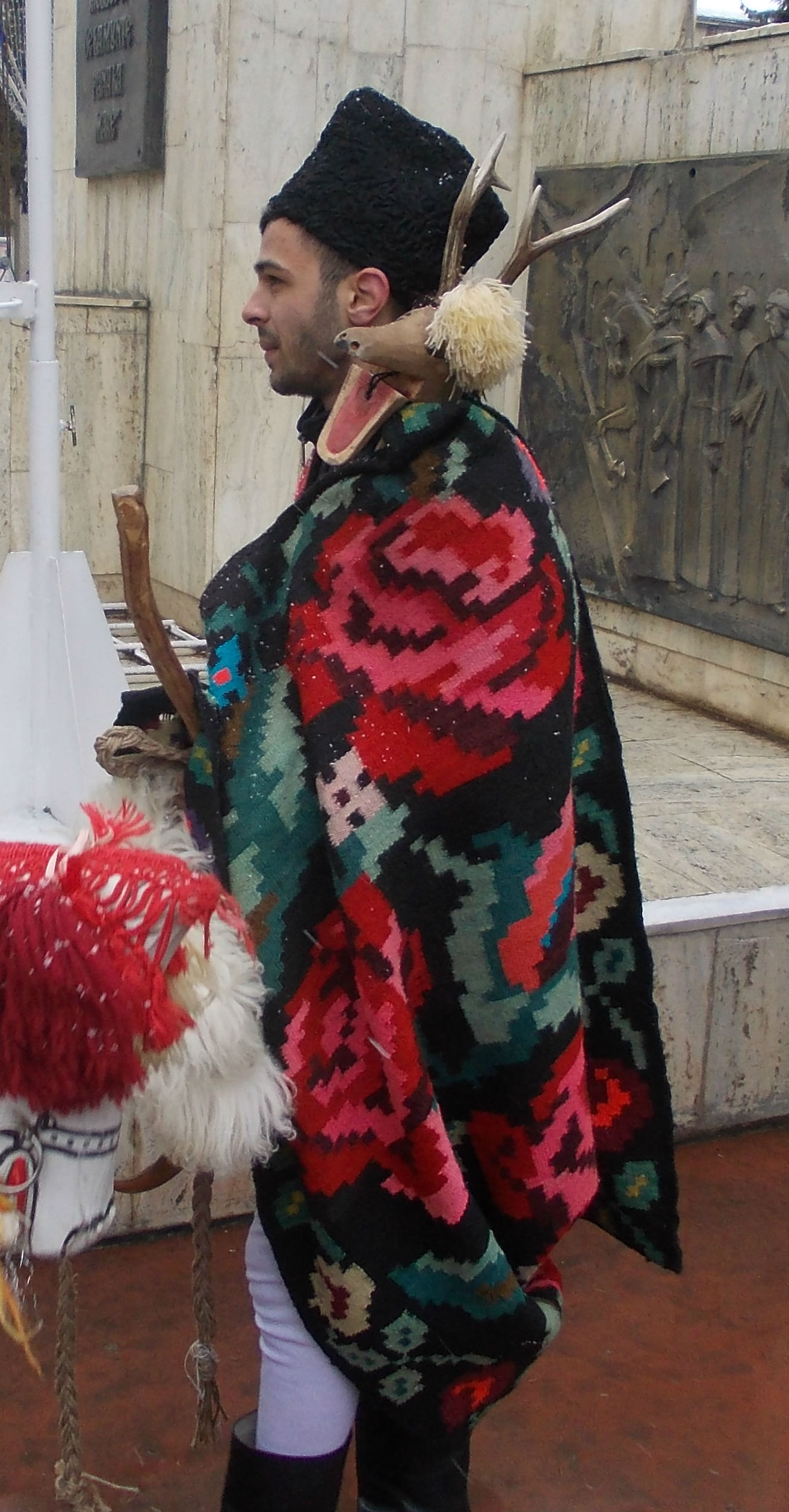 Urător deghizat în capră din Piatra Neamţ